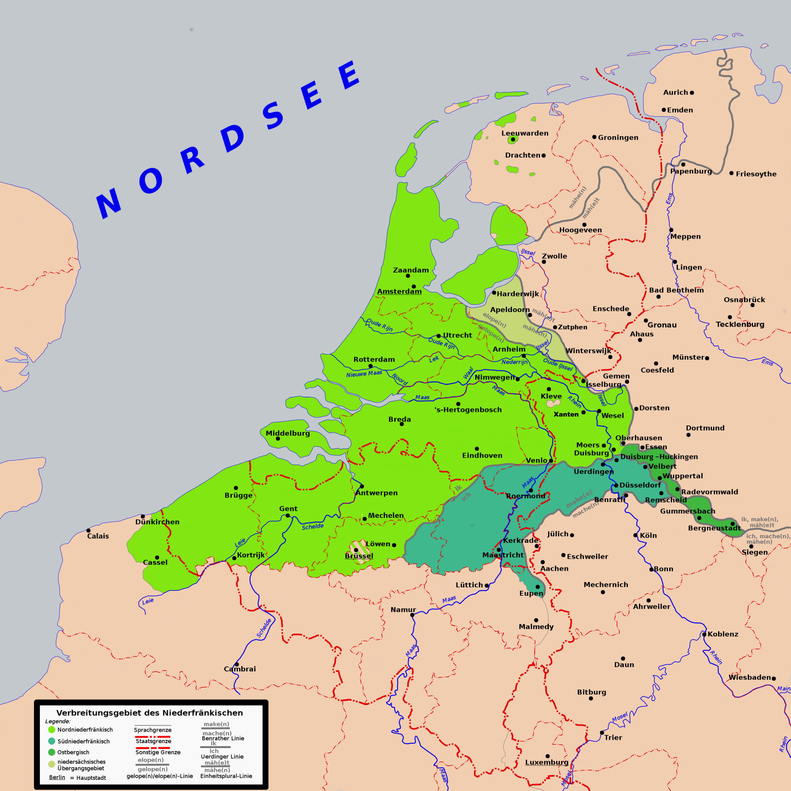 Darstellungskarte der niederfränkischen Dialektgruppen.Legende: = Nordniederfränkisch = Südniederfränkisch = Ostbergisch = niedersächsisches Übergangsgebiet, das verschiedentlich zum Niederfränkischen gezählt wird.